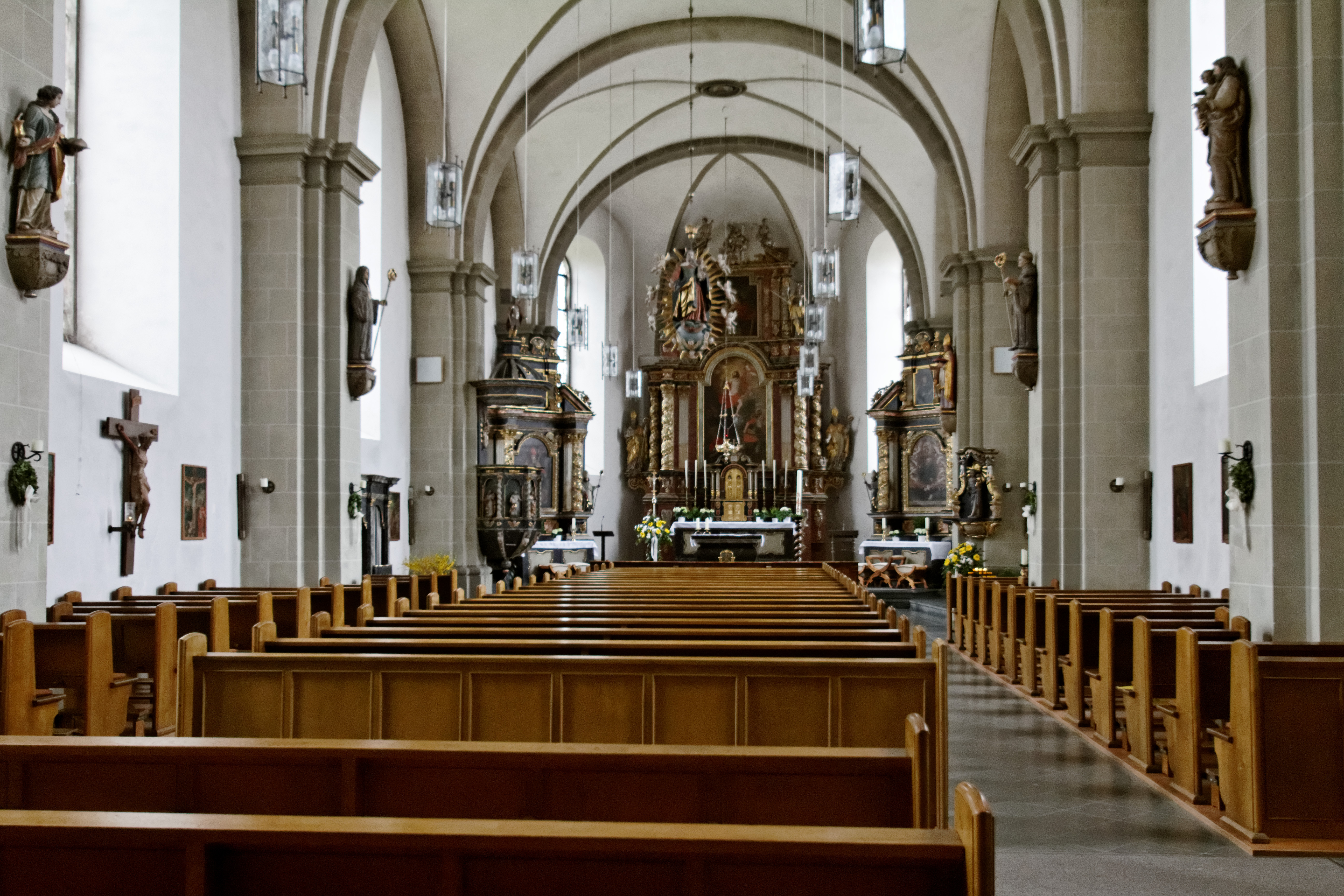 Warstein-Belecke, St.Pankratius Kirche Innenansicht